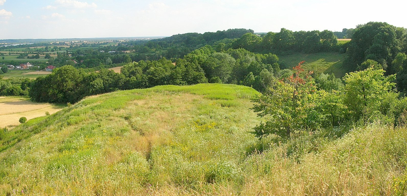 Grodzisko w Strzelcach Dolnych. Widok ze szczytu na parów strzelecki.